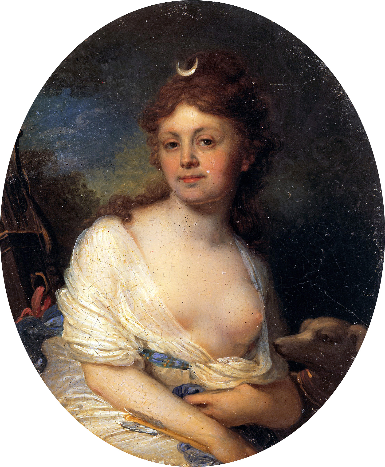 Портрет на цинке, 13х11 см., овал. В собрании Государственной Третьяковской галереи.